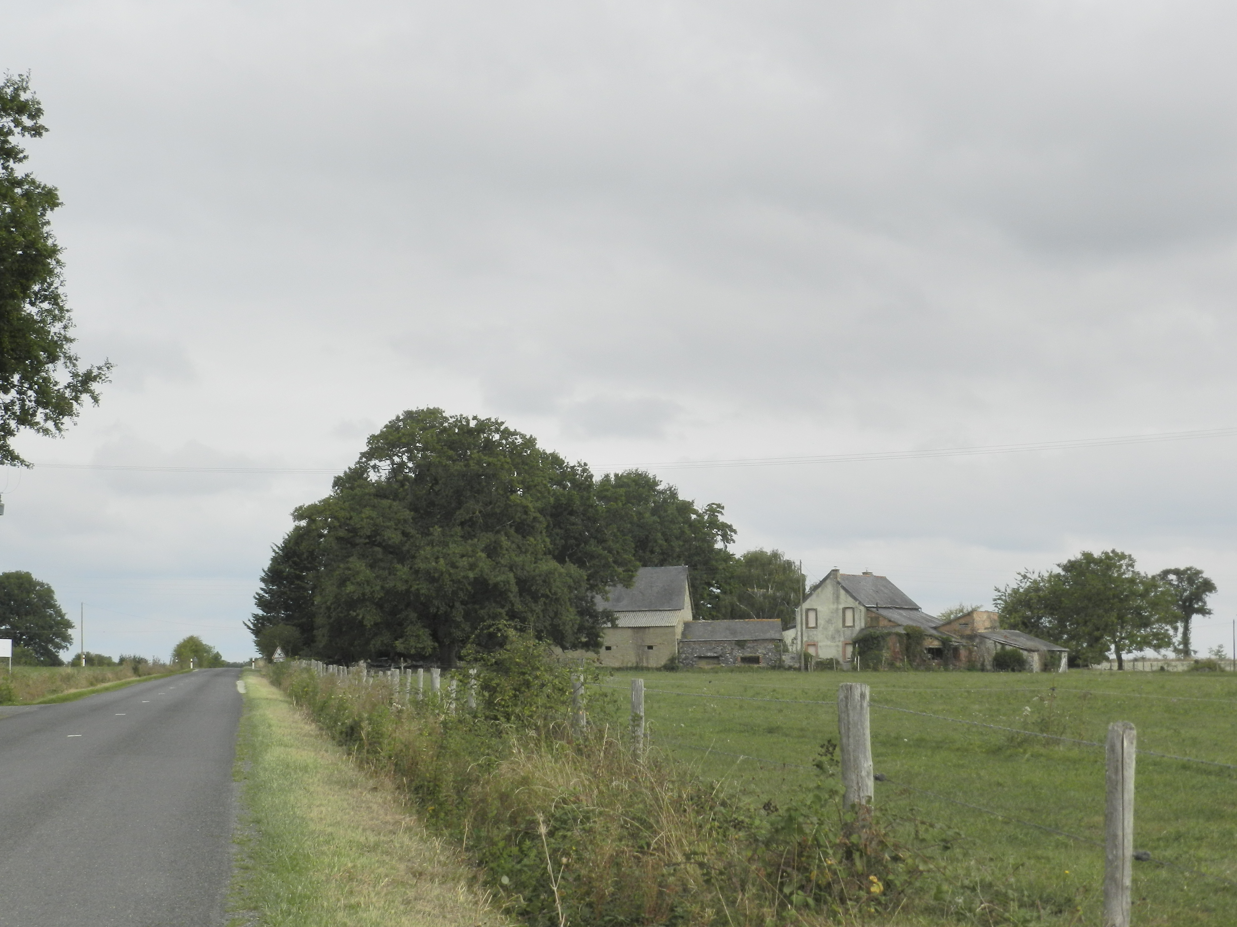 "La mine " à côté du puits Henry